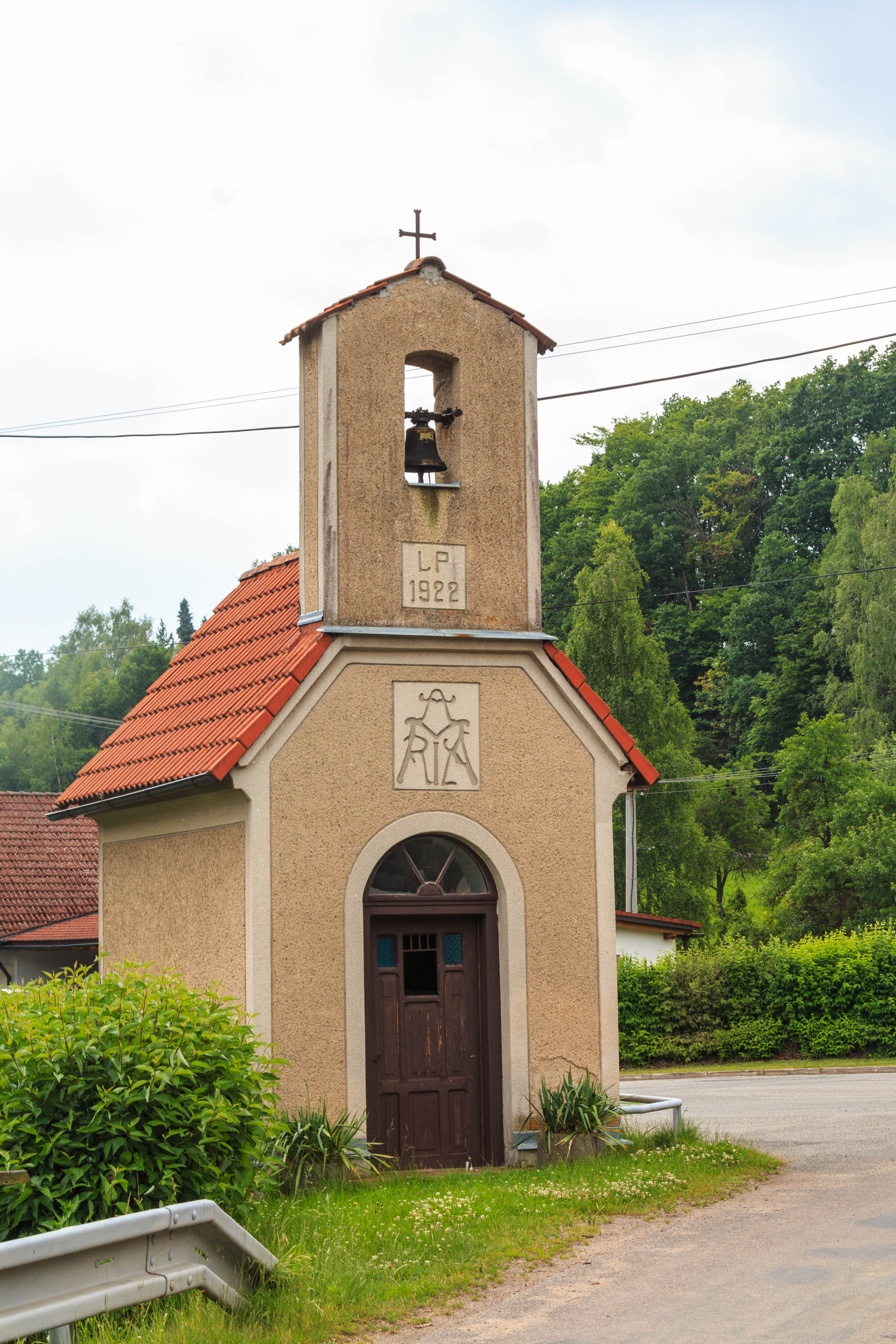 Libchyně - kaple